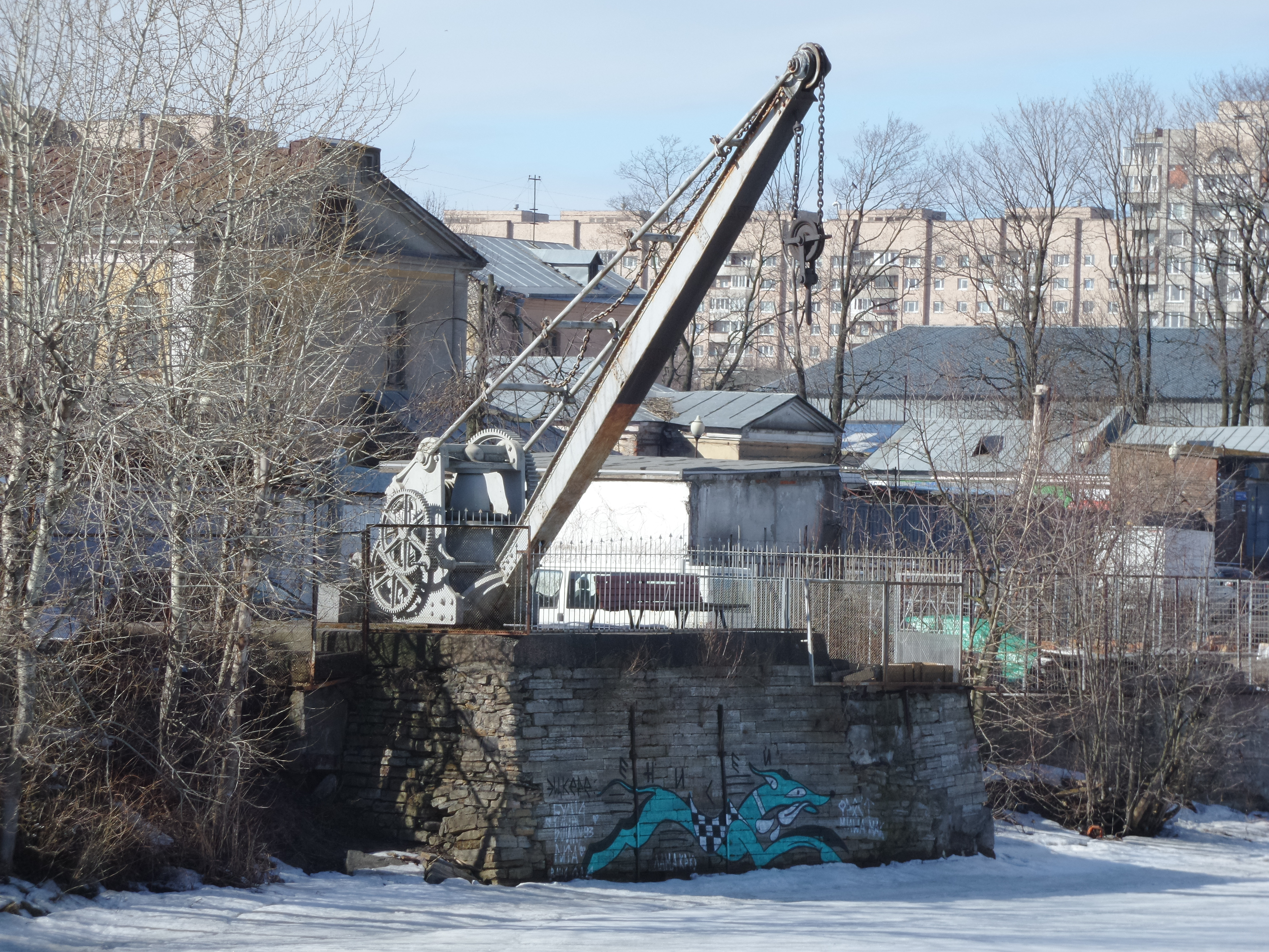 Паровой кран на берегу Галерной гавани, установлен в 1854 г.